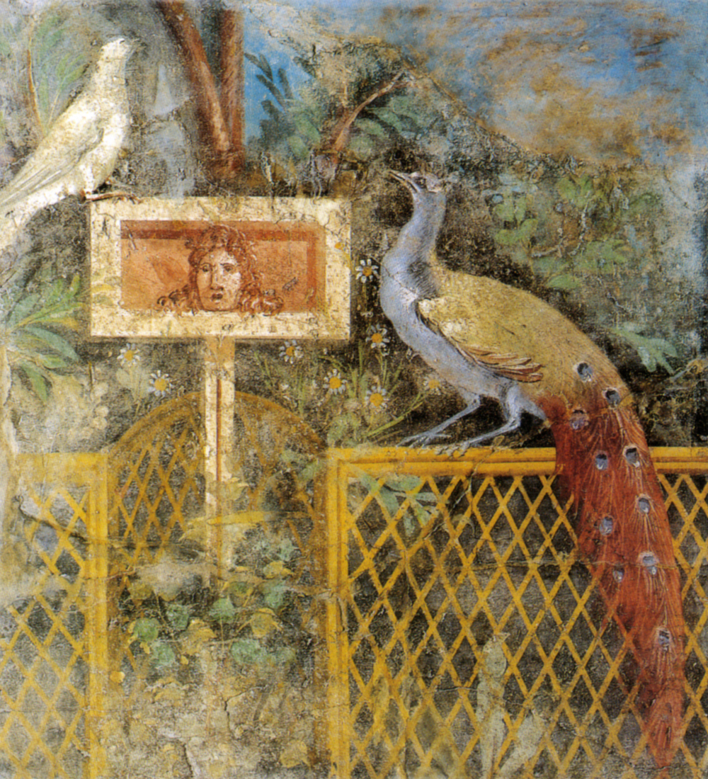 Museo Archeologico Nazionale di Napoli (inv. 8760). Da Pompeii. - Scena di un giardino con transenna a cannucce, pinax, e uccelli variopinti alludenti a divinità (colomba e pavone). see filename